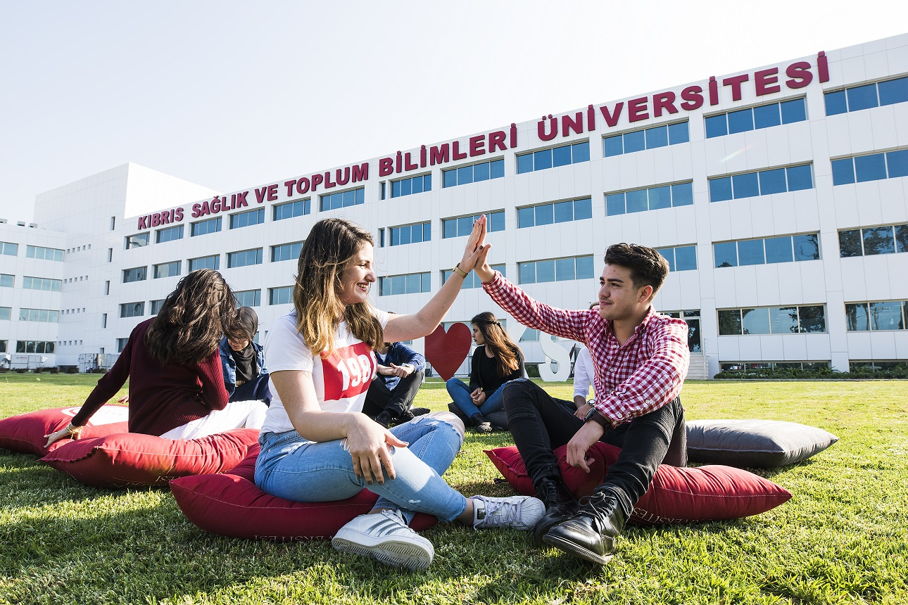 KSTU Kampüsü Öğrencileri